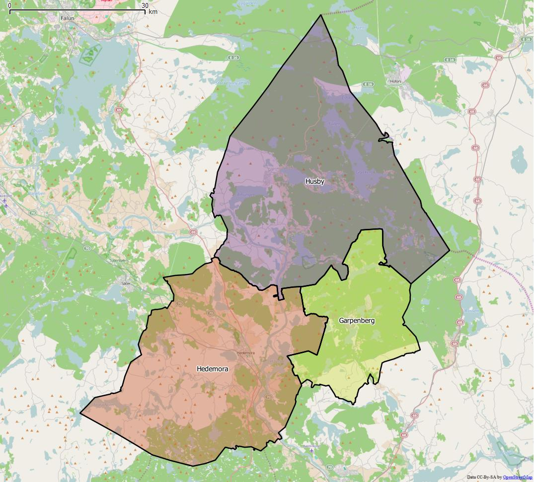 Distriktsindelningen i Hedemora kommun World file 109.98618089722279478 0 0 -109.98618089722279478 1725319.39778631227090955 8540095.9278759378939867